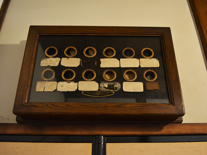 女中部屋脇の廊下上部に設置された、女中を呼び出すための呼び鈴。